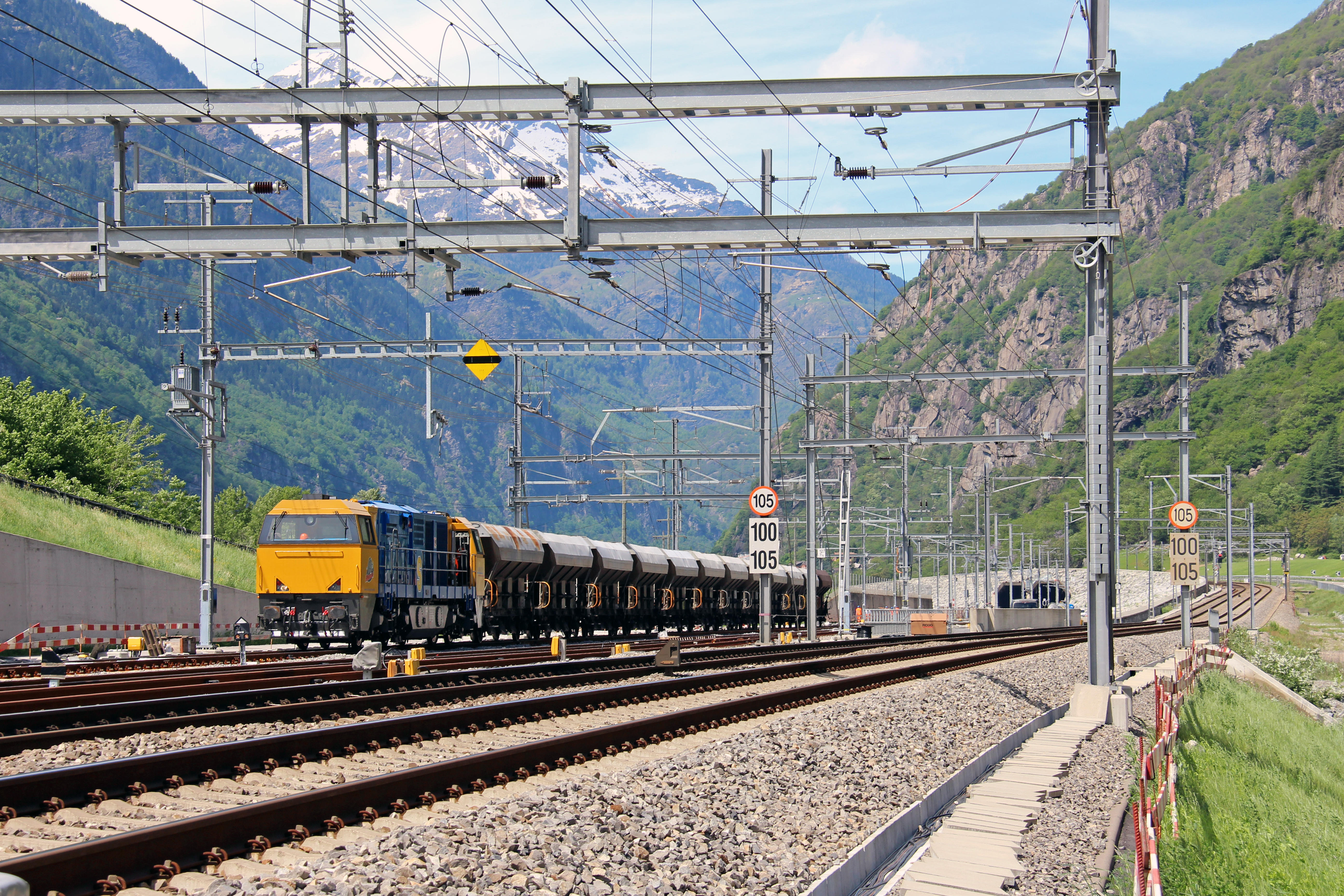 Das Südportal des Gotthard-Basistunnels mit einem Schotterzug. Hinter diesem hervor führt über das Südportal in den Vordergrund die über die Tunnelportale und parallel zur Neubaustrecke verlegte Stammlinie. (17/24)